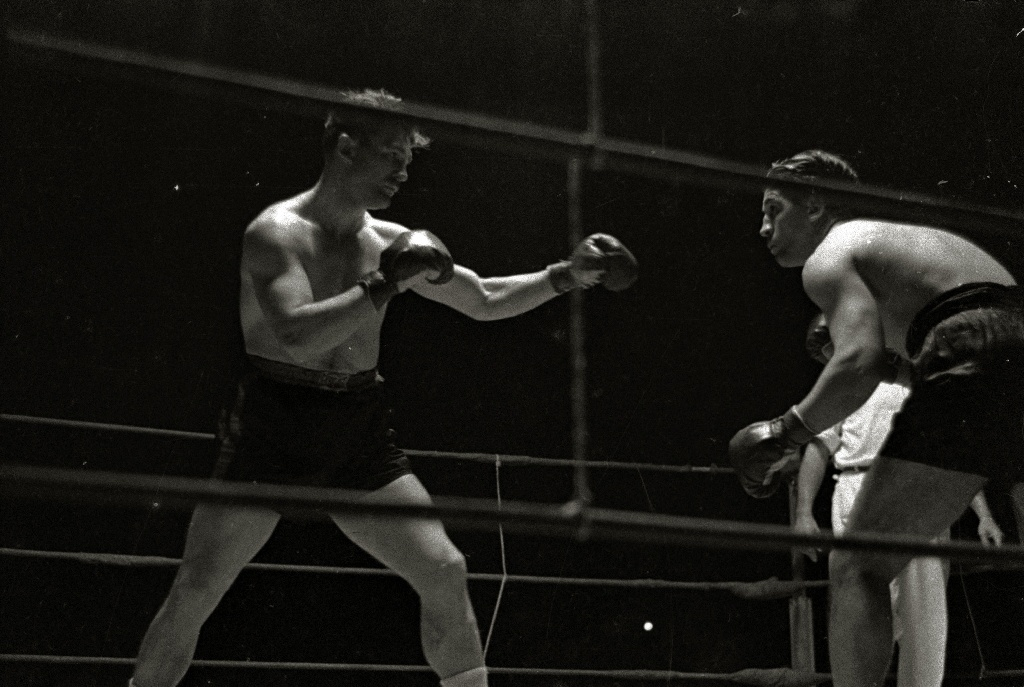 Título original: Escena de boxeo en un ring (2/5) Localización: Guipúzcoa